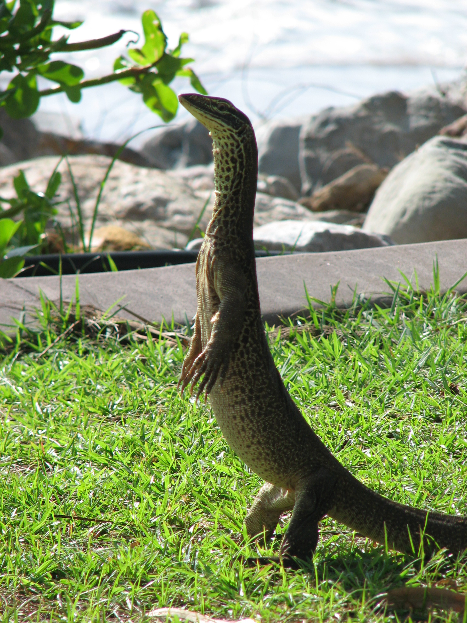 Varan de Gould (Varanus gouldii) en position de veille